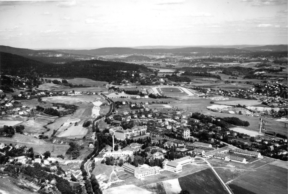 Akersdalen (senere kalt Groruddalen), omtrent på den tiden Aker ble innlemmet i Oslo.